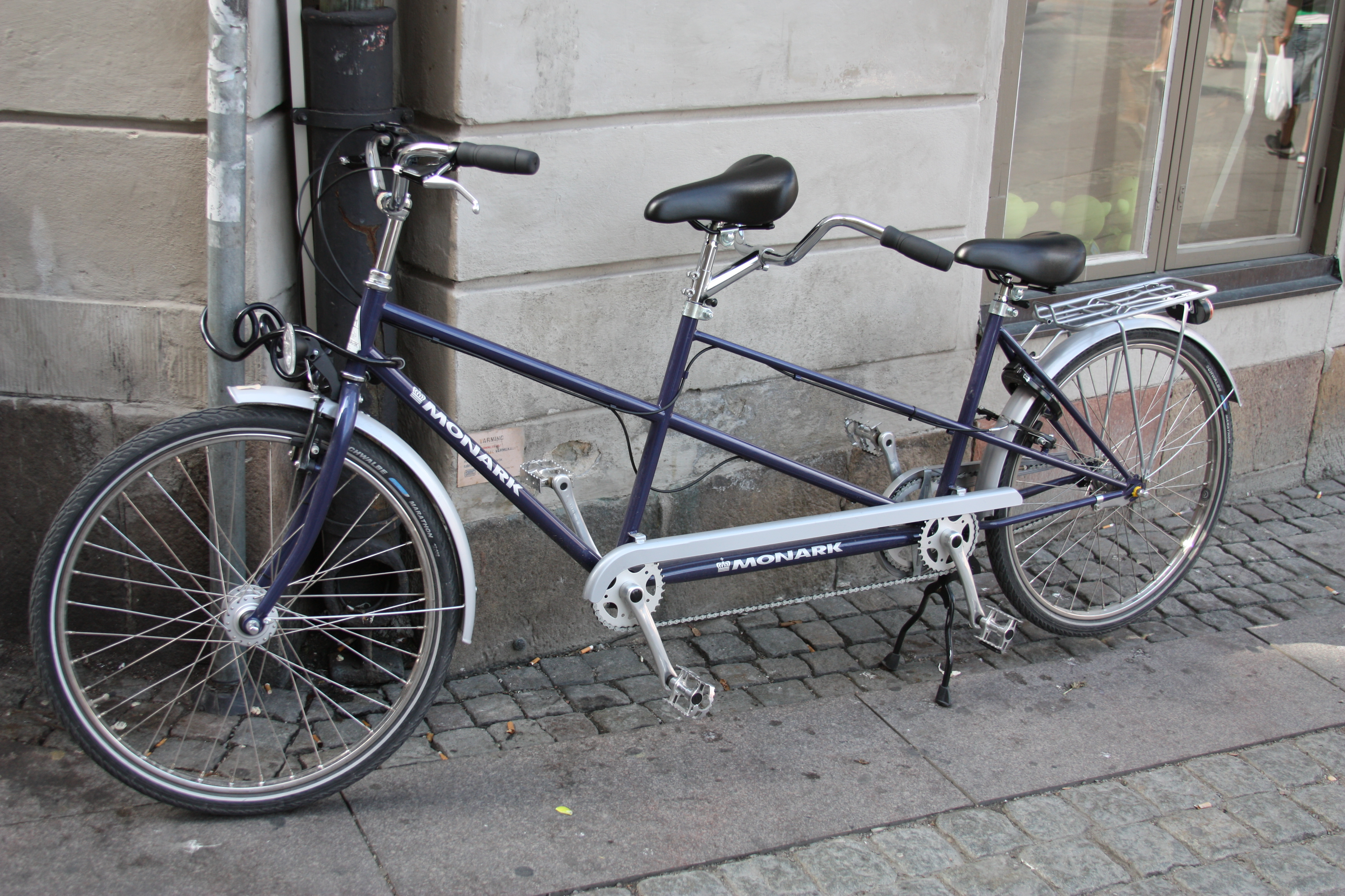 Stockholm